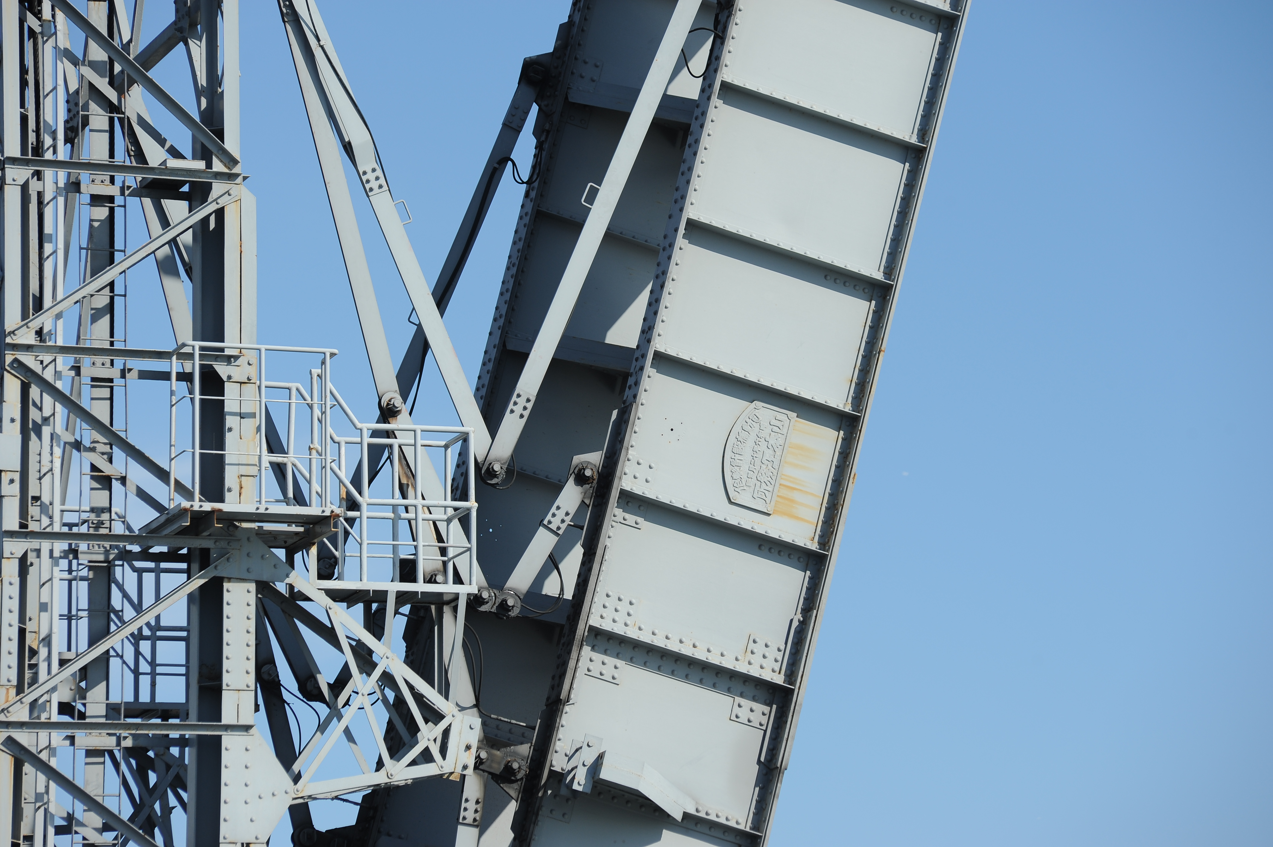 末広橋梁 "可動橋設計製作 山本工務所"